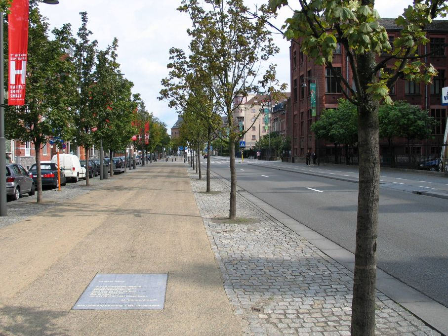 Groene boulevard te Hasselt (België) - eigen foto